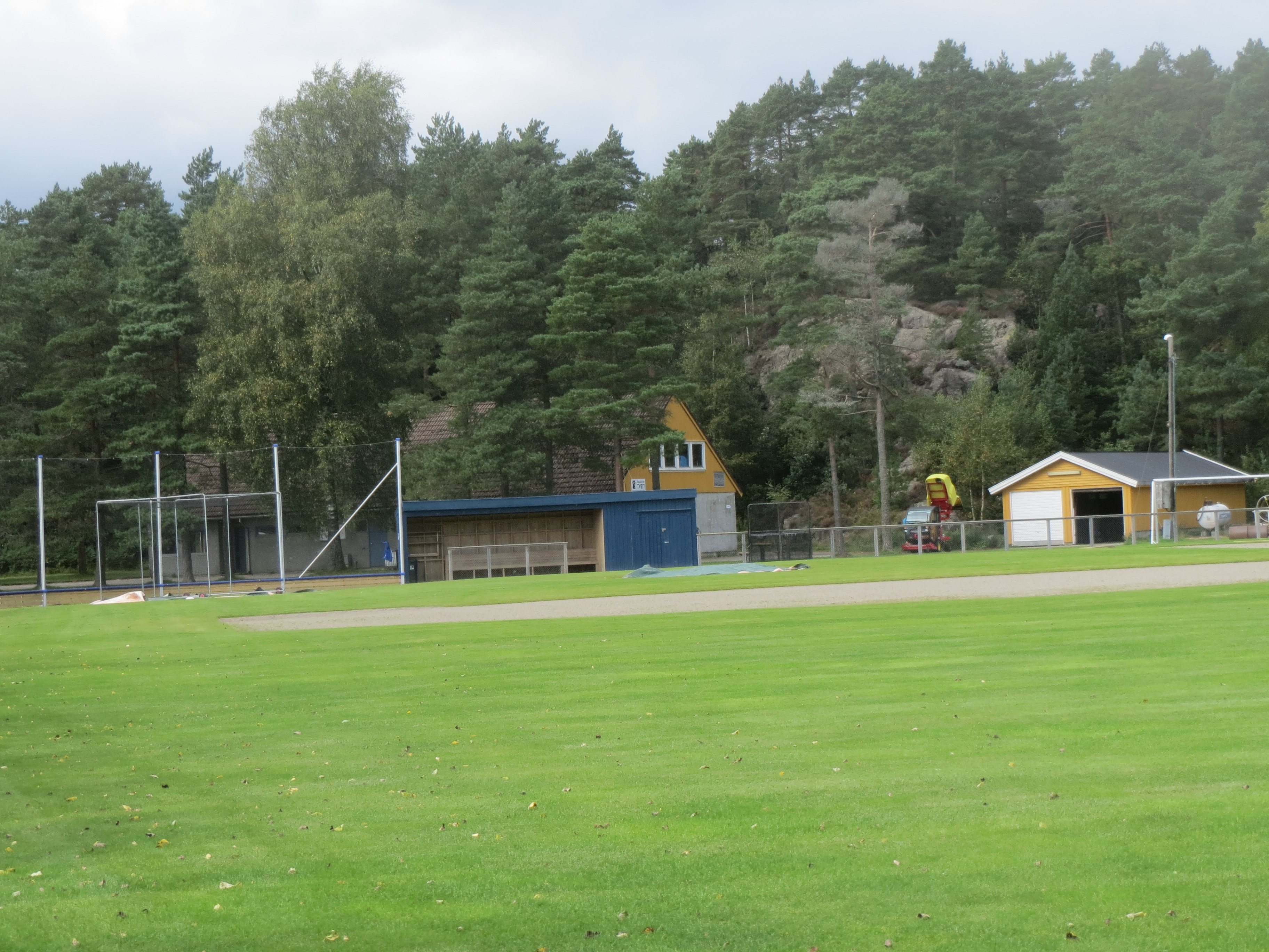 Dønnestad idrettsplass i Kristiansand, Vest-Agder